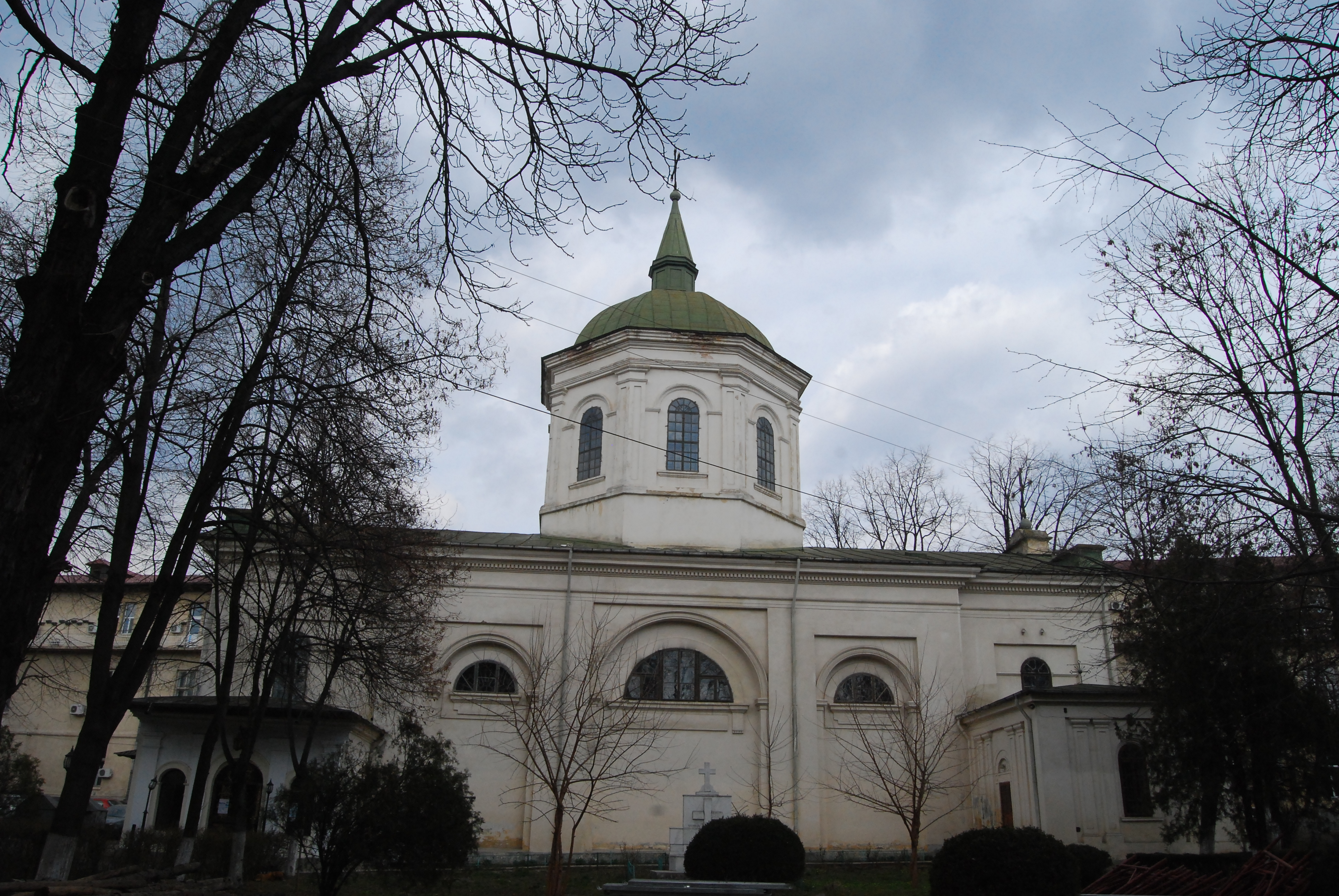 Biserica "Sf. Spiridon" 01